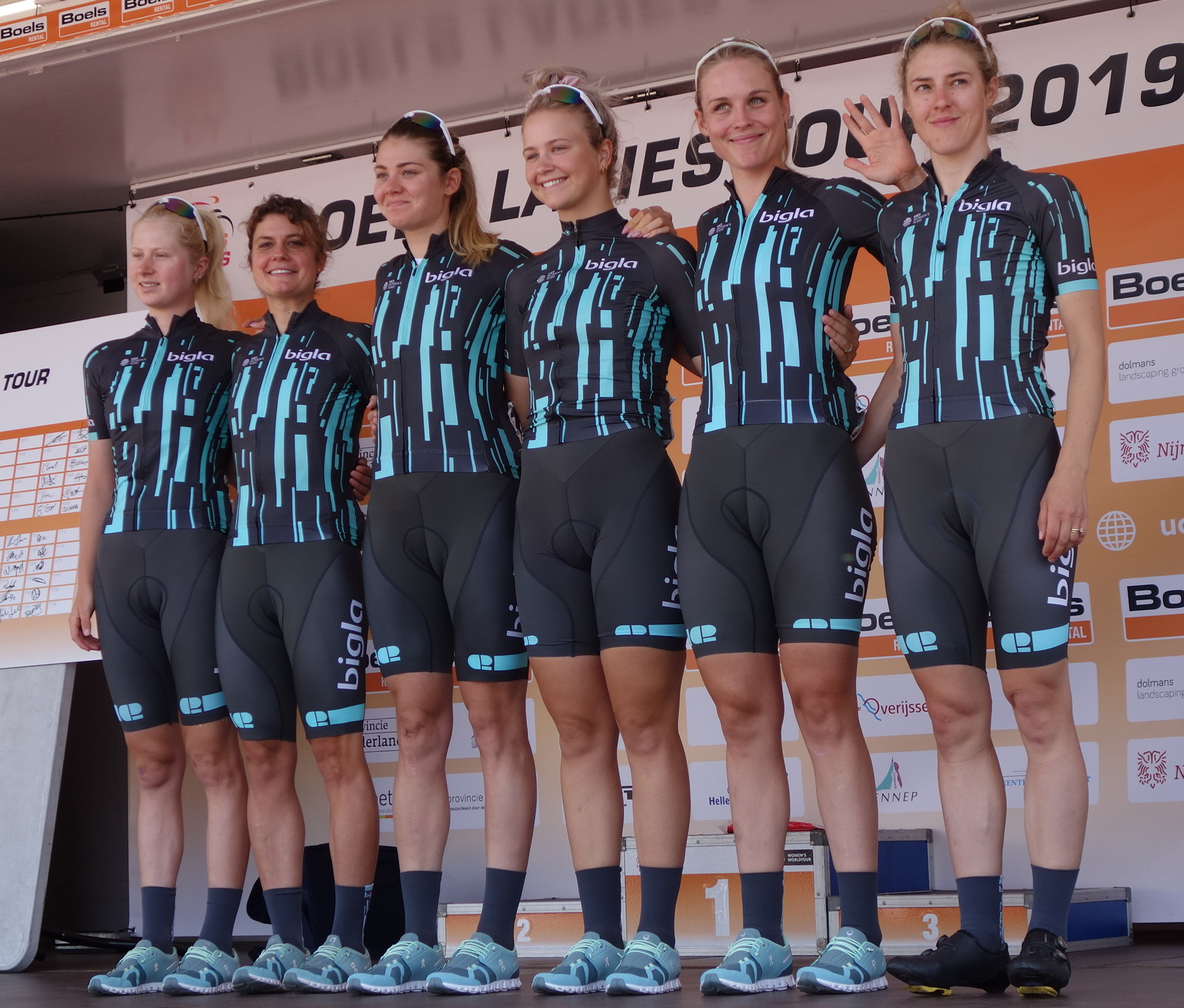 Bigla bij de start van de eerste etappe van Stramproy naar Weert in de Boels Ladies Tour 2019